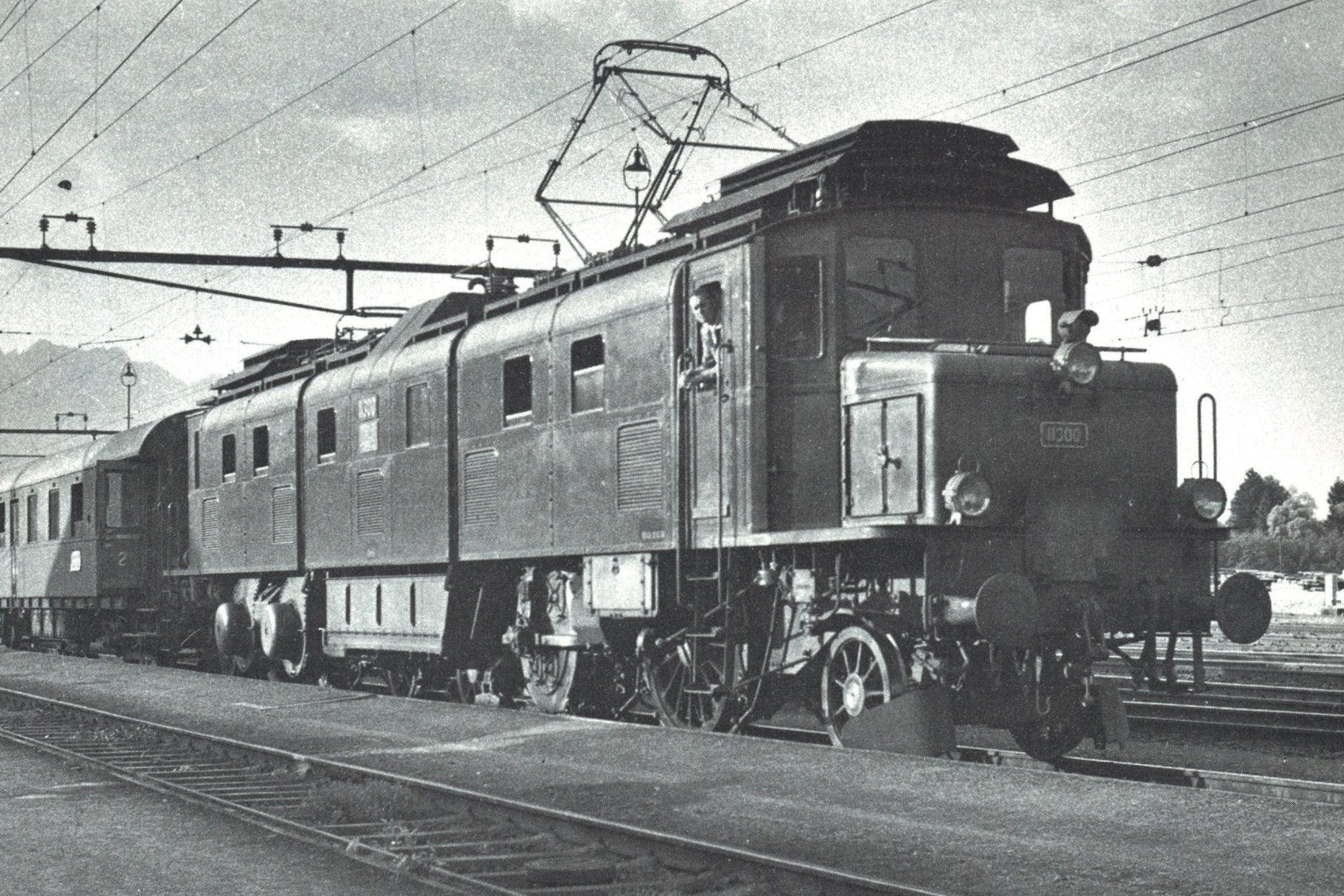 Elektrische Lokomotive Ae 4/8 11000 ab 1929 11300 der Schweizerische Bundesbahnen (SBB). Probelokomotive für die Einzelachsantriebe von Jakob Buchli und Otto Tschanz mit der Achsfolge (1‘Bo1‘)(1‘Bo1‘).